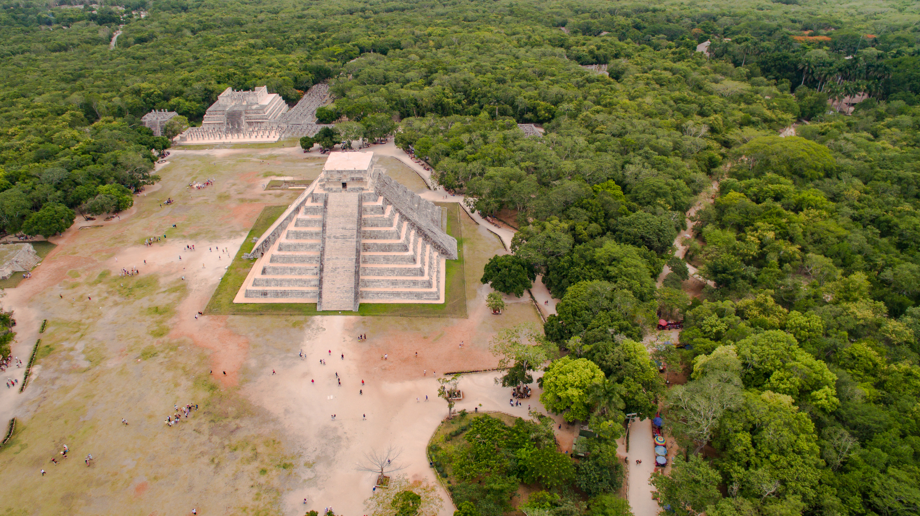 UNESCO World Heritage Site. In 2007, Chichen Itza's El Castillo was named one of the New Seven Wonders.